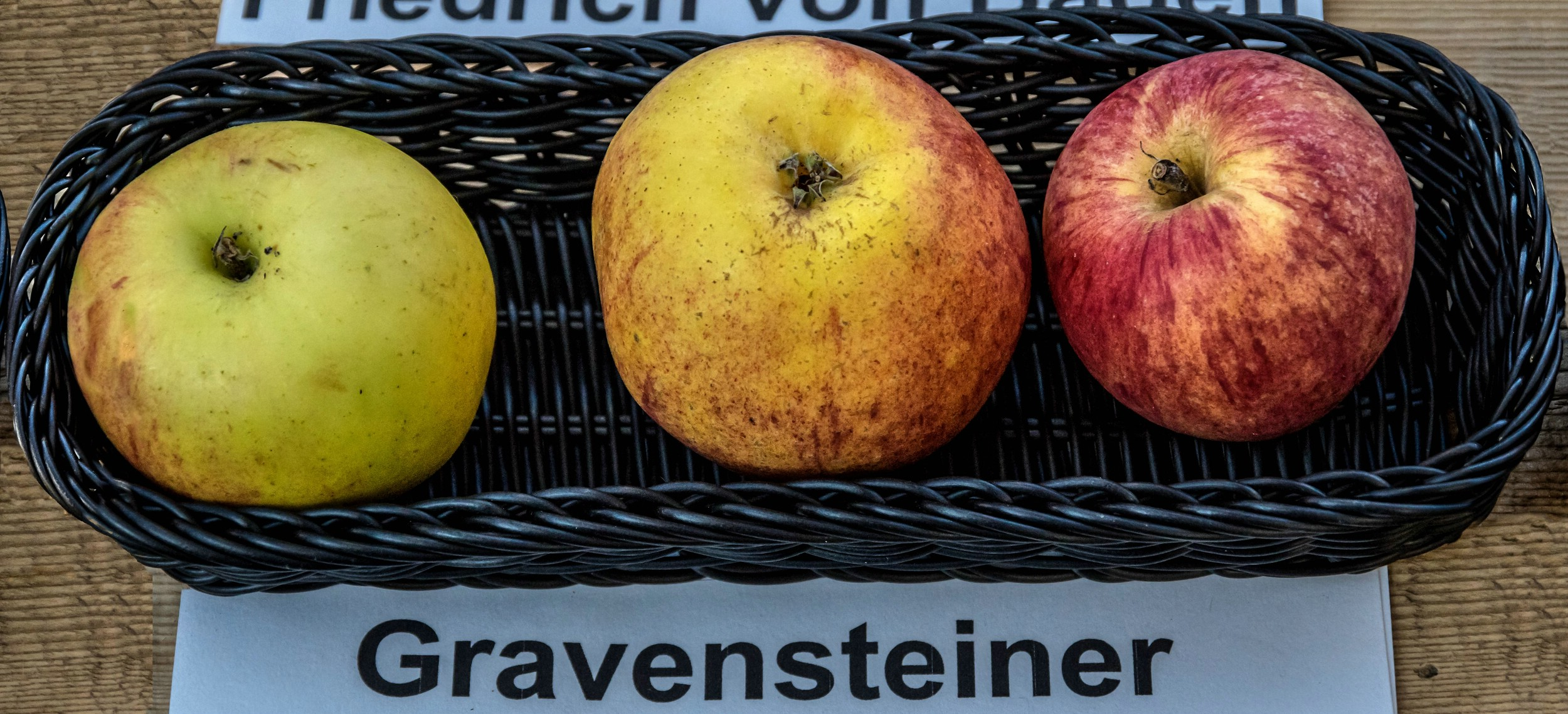 Alte Apfelsorten, von denen es im Badischen noch tragende Bäume gibt. Alle Aufnahmen au dem Oktober 2015